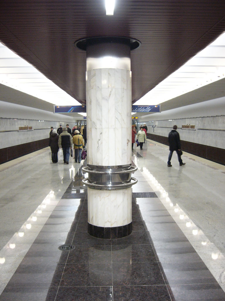 Metro station Borisovski Trakt (Борисовский тракт, Барысаўскі тракт) in Minsk, Belarus